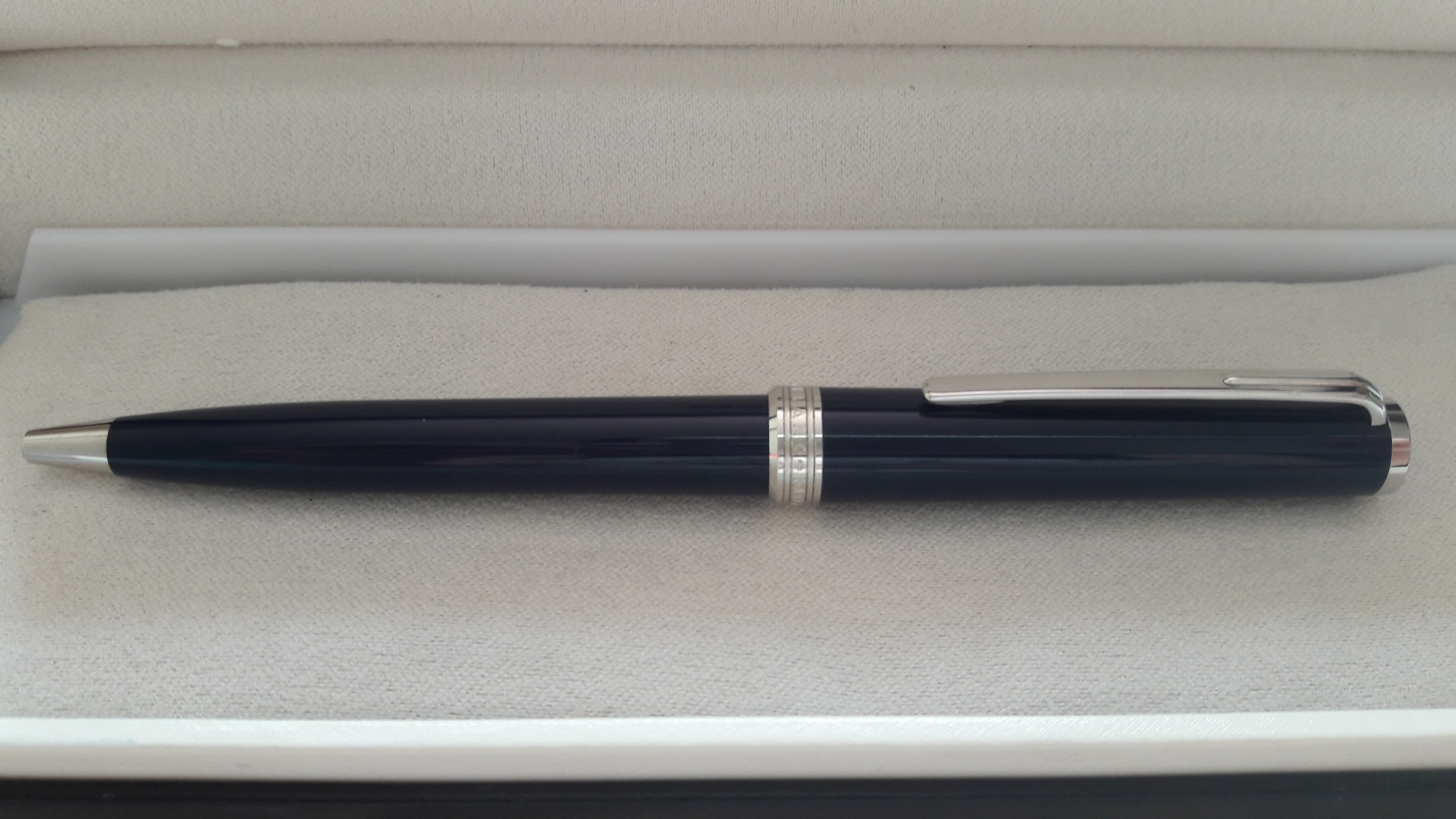 MontBlanc Flix blue